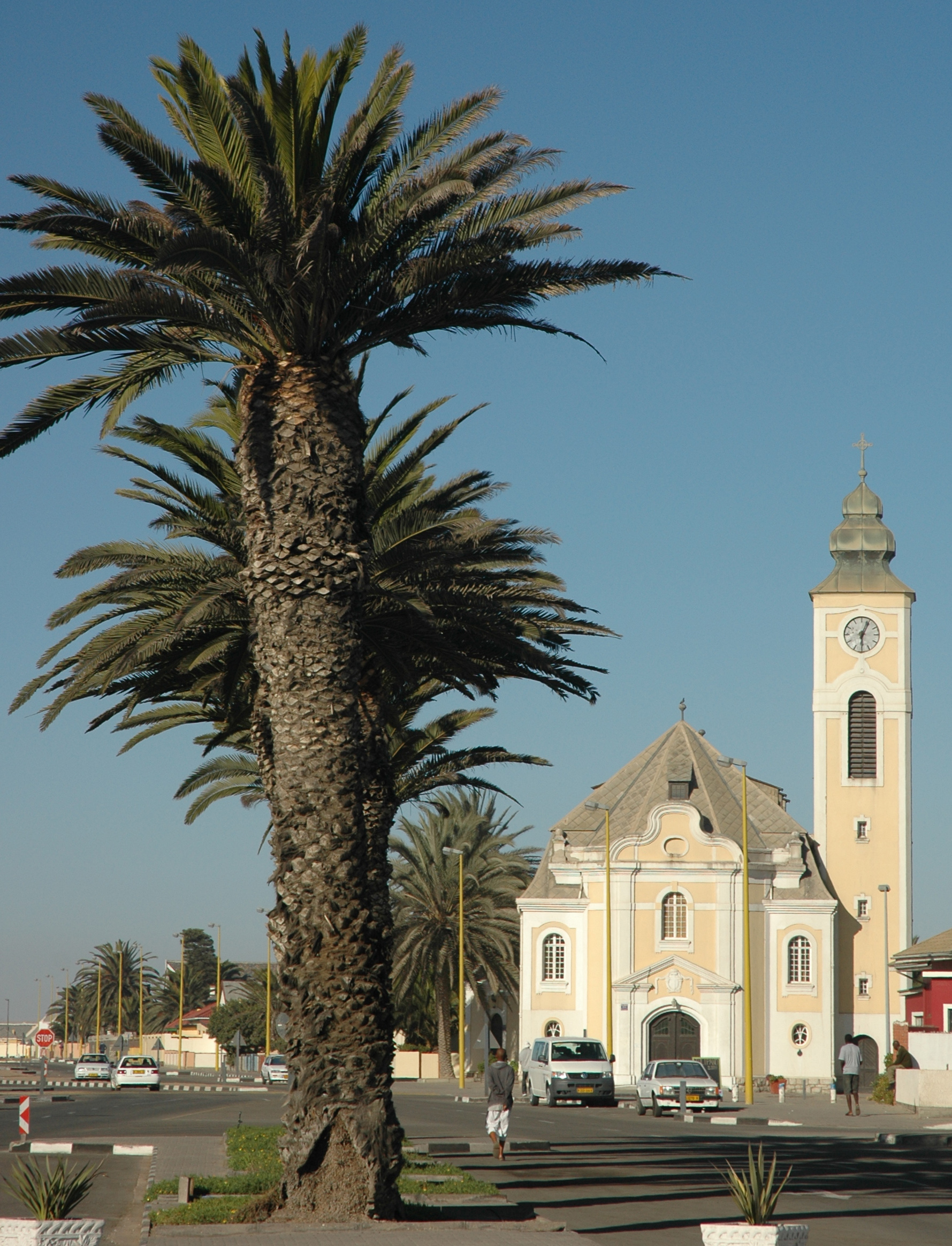 Namibie Sesriem Canyon Photographie prise par GIRAUD Patrick